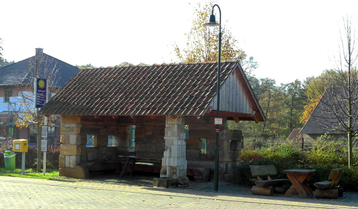 Bushaltestelle in Altenhagen II